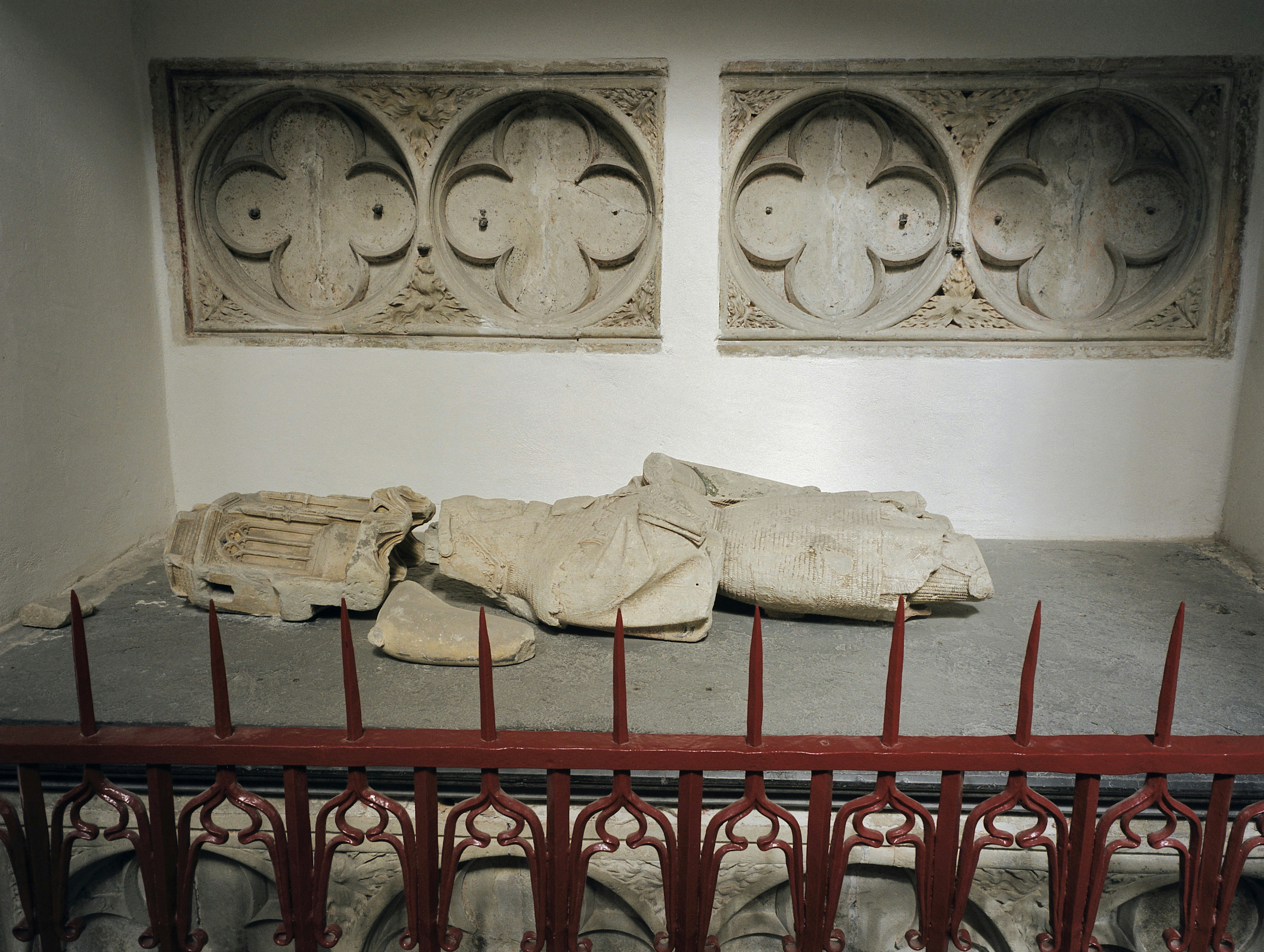 Onze Lieve Vrouwe Kerk: Grafmonument van Jan II (opmerking: Gemaakt voor boek Monumenten voor Oranje en Nassau)